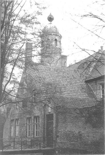 Pastorie van Houtem-Veurne. Westgevel uit 1680. Gedeeltelijk omwald. Hier was het hoofdkwartier van het Belgisch leger vanaf februari 1915 tot eind october 1918. Hier vergaderde Koning Albert I met koning Georges van Engeland, koning Victor Emmanuel en de franse staatsman Boincarré. De pastorie heeft een fraaie toren dat ook nog de peperbustoren wordt genoemd. Vlaamse Rennaissancestijl. Hier verbleef Abt Christiaan Druve van de Sint-Niklaasabdij van Veurne en talrijke parochiepriesters. Heden is het een geklasserd gebouw en eigendom van een arts uit Rijsel. De foto werd door mij genomen in het jaar 1967. Herman De Rave. Deze foto werd ingezonden om geplaatst te worden bij het lemma van Houtem-Veurne.